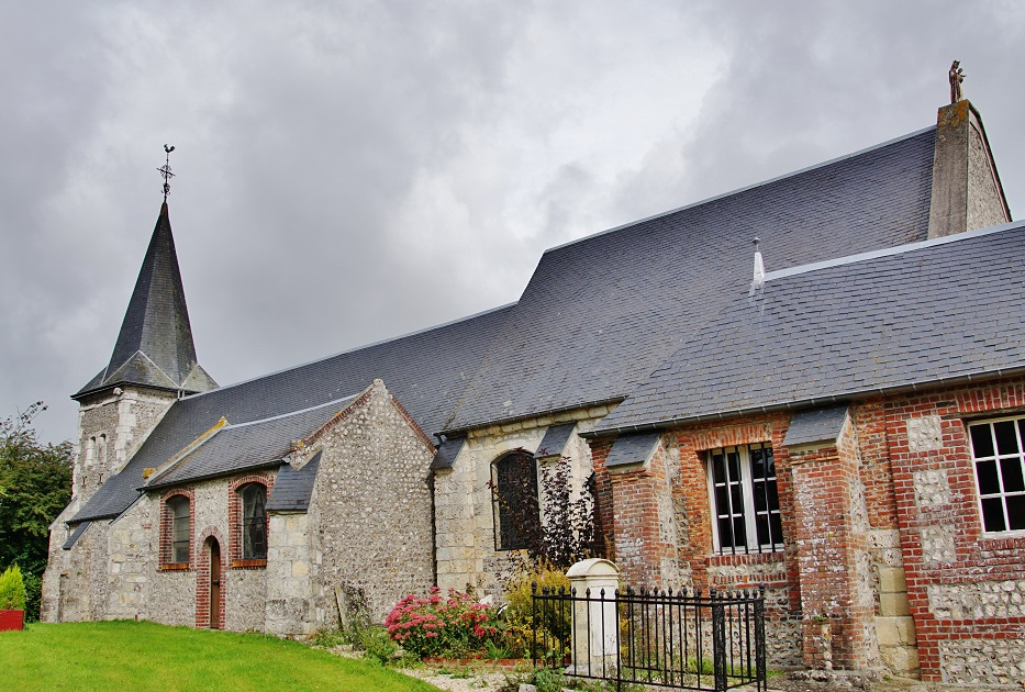 église st Etienne